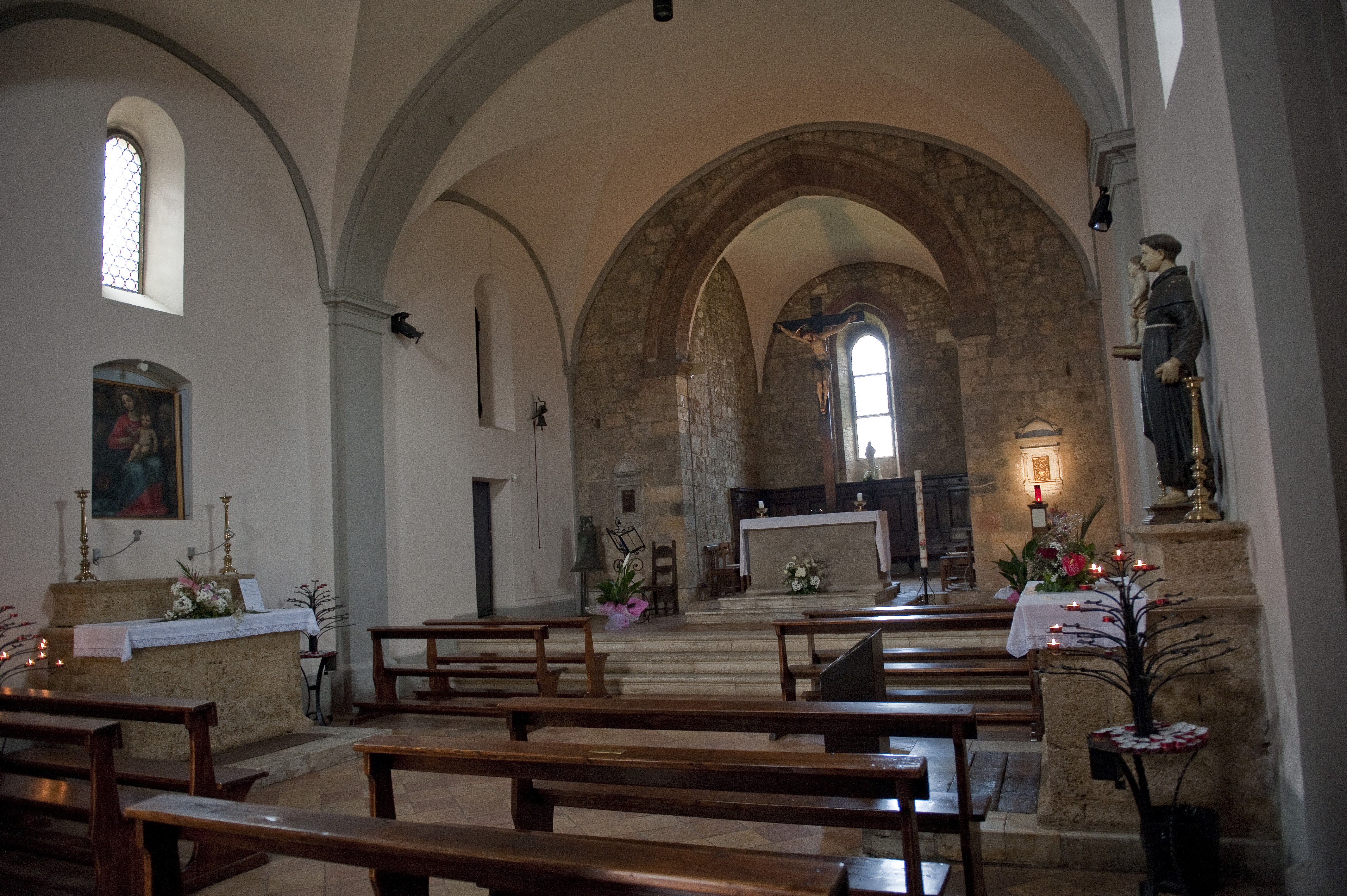 Interno della chiesa di Santa Maria Assunta a Monteriggioni (Siena)